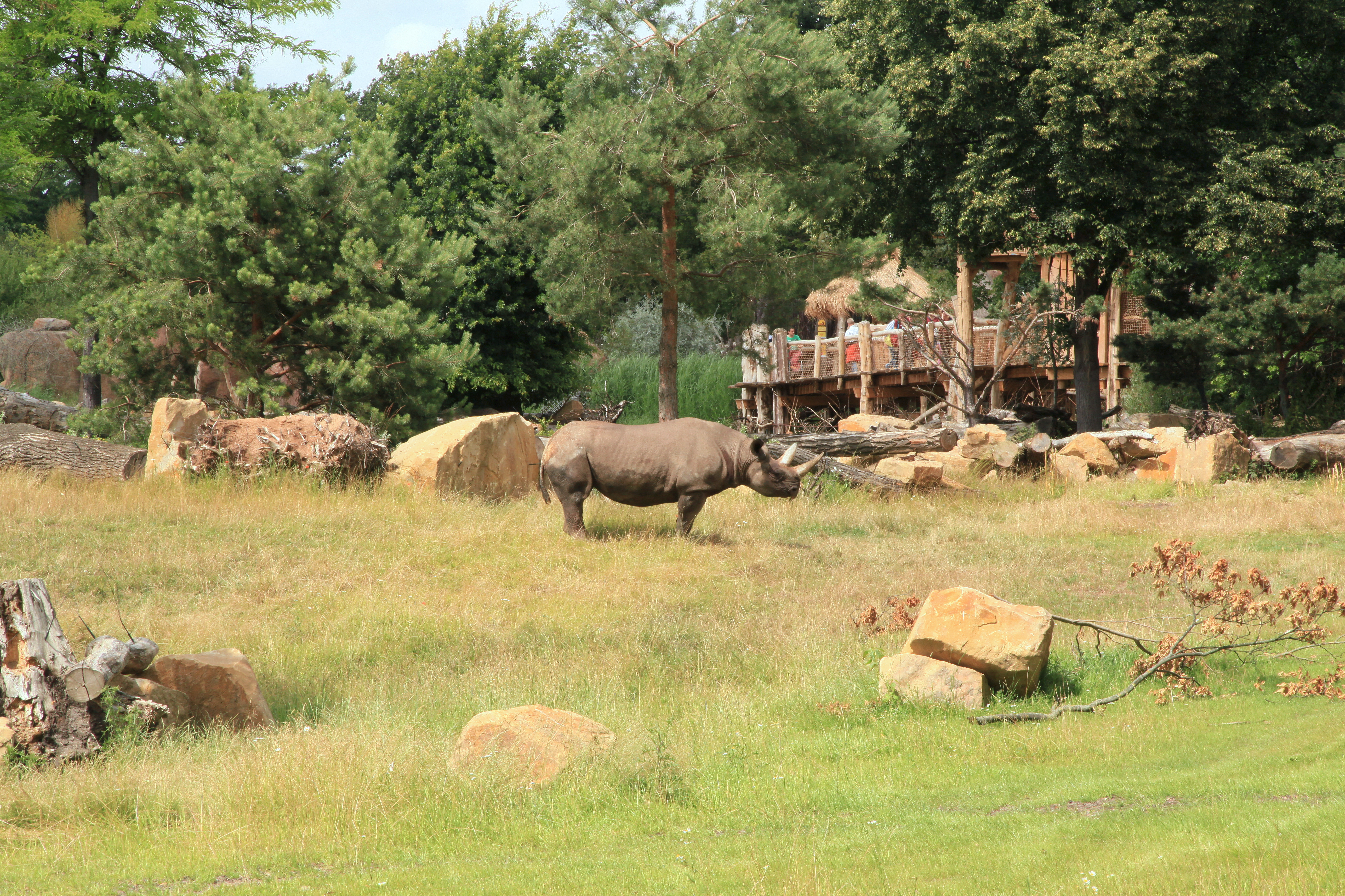 Diceros bicornis in Afrika im Zoo von Leipzig